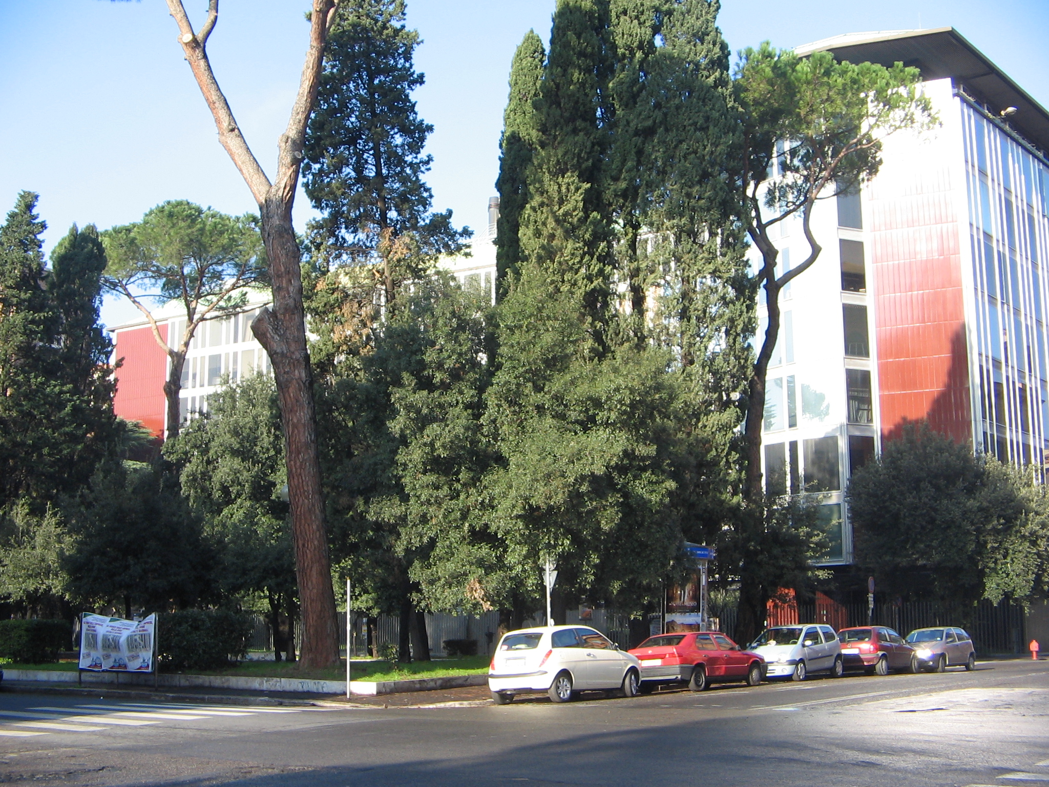 Palazzo Rai di Viale Mazzini a Roma, nel quartiere Della Vittoria